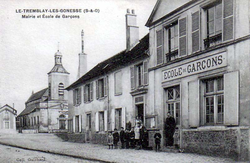 Caption:"LE-TREMBLAY-LES-GONESSE (S-&-O)Mairie et École de GarçonsColl Guichard"